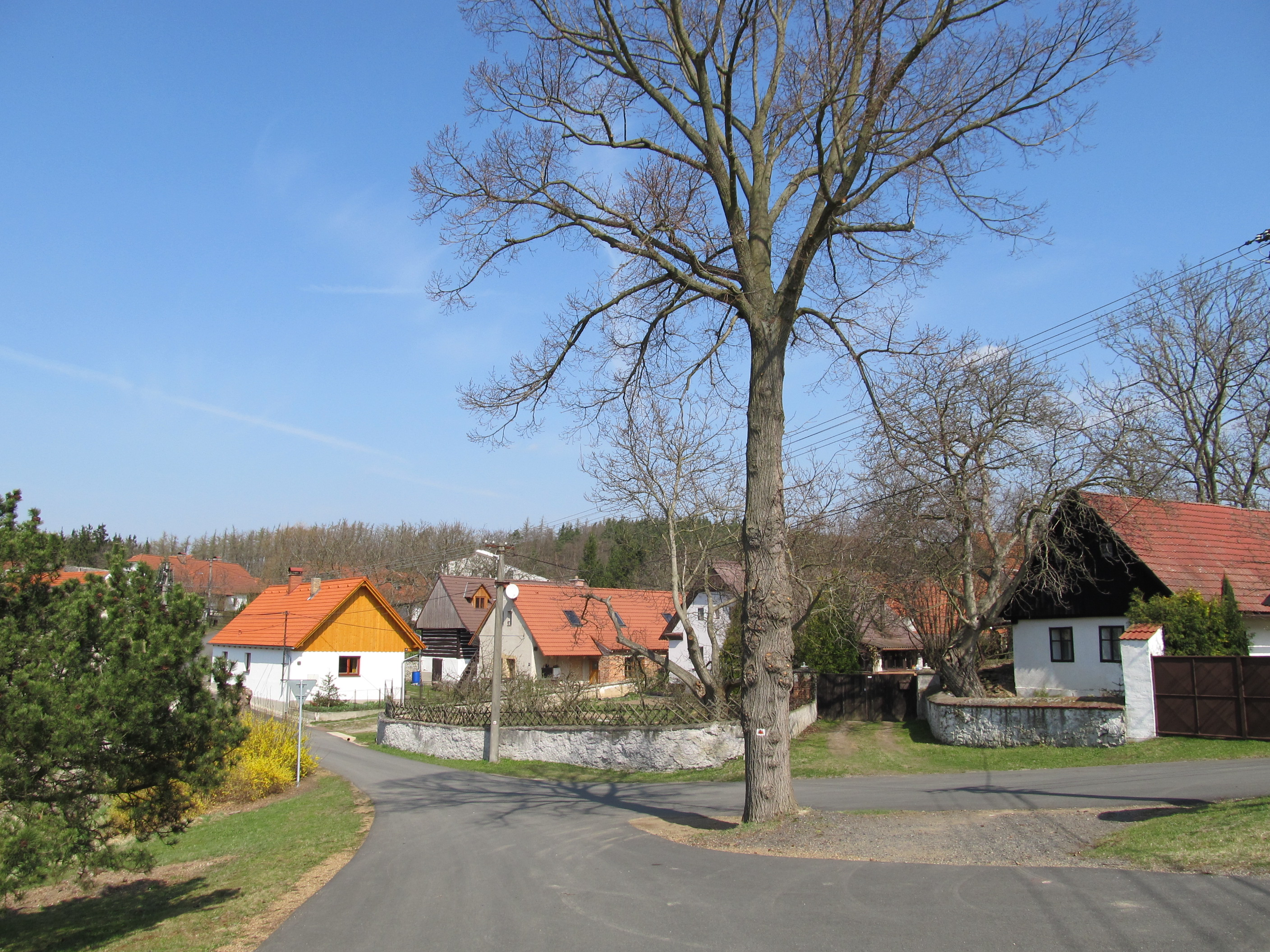 Chlum - náves, pohled k domům čp. 13, 12, 18, 11.